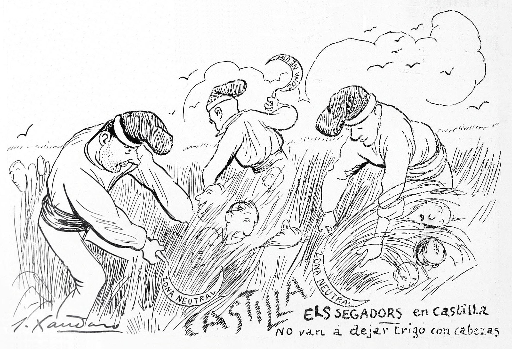 Apuntes cómicos. This is a retouched picture, which means that it has been digitally altered from its original version. Modifications: Parts of the print not related to this particular composition erased..